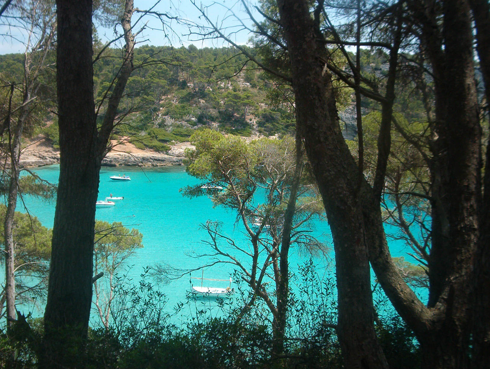 Playa de Cala Trebaluger, Ferrerias, Menorca.